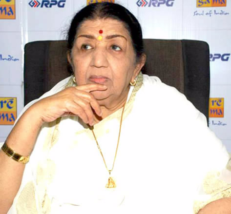 Lata Mangeshkar graces Saregama album launch